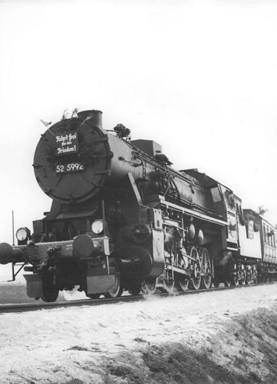 Dampflok 52 5992 (BR 52) Zentralbild Ben-Pe 31.10.1953 Neue Eisenbahnstrecke in Betrieb. Am 30. Oktober 1953 weihte der Minister für Eisenbahnwesen Roman Chwalek die wideraufgebaute Strecke von Templin nach Prenzlau ein. An der Vorderfront der Lokomotive, die den ersten Zug auf dieser Strecke fuhr, stand die Losung "Fahrt frei für den Frieden". UBz: Der erste Personenzug auf der neuen Strecke.